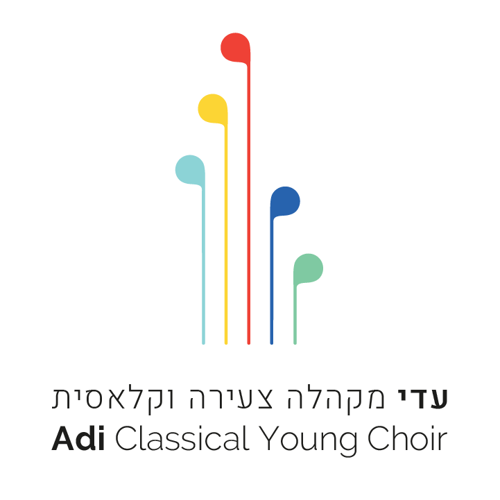 לוגו חדש החל משנת 2017